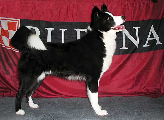 Чемпион России Хард